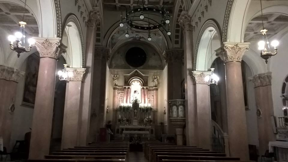 Interni Santuario Navata centrale